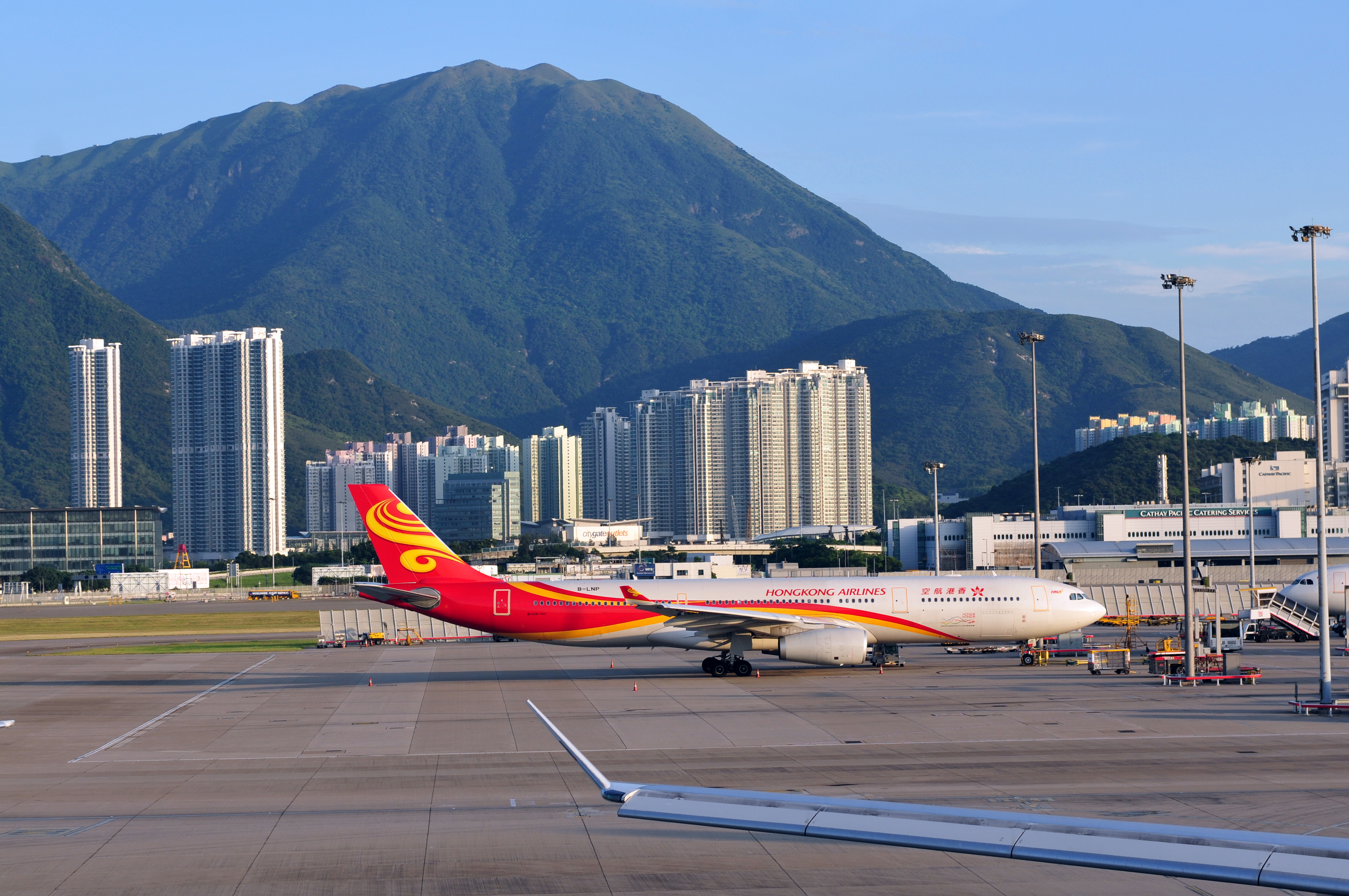 Wikimania 2013 Hongkong